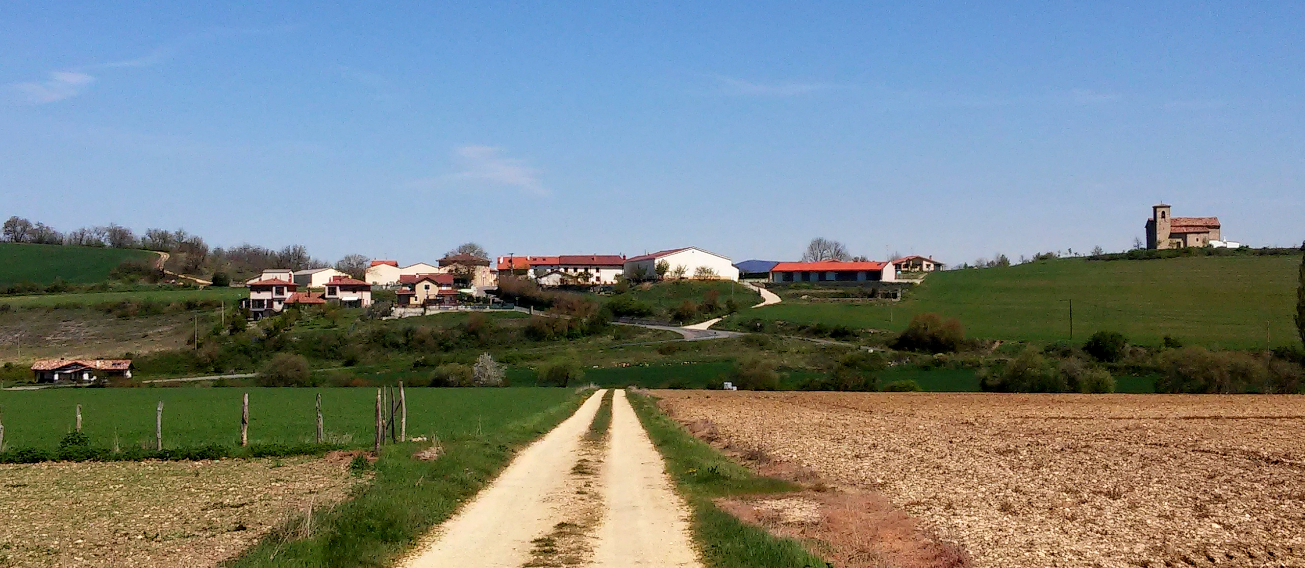 Aziluren ikuspegia (Iruraitz-Gauna)